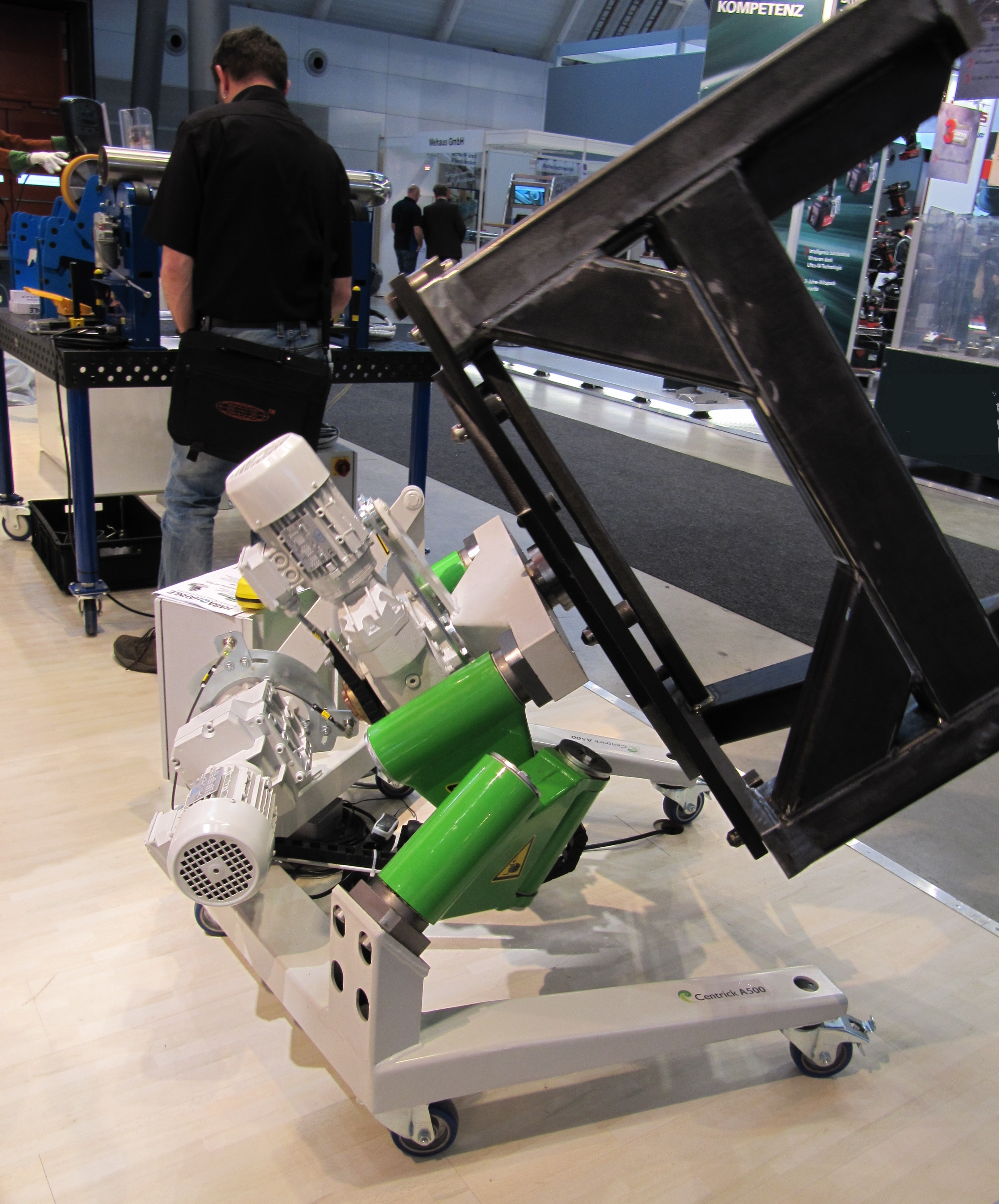 Manipulator, Schweißmanipulator Centrick A 500 mit Universal-Tischplatte und darauf befestigtem Werkstück